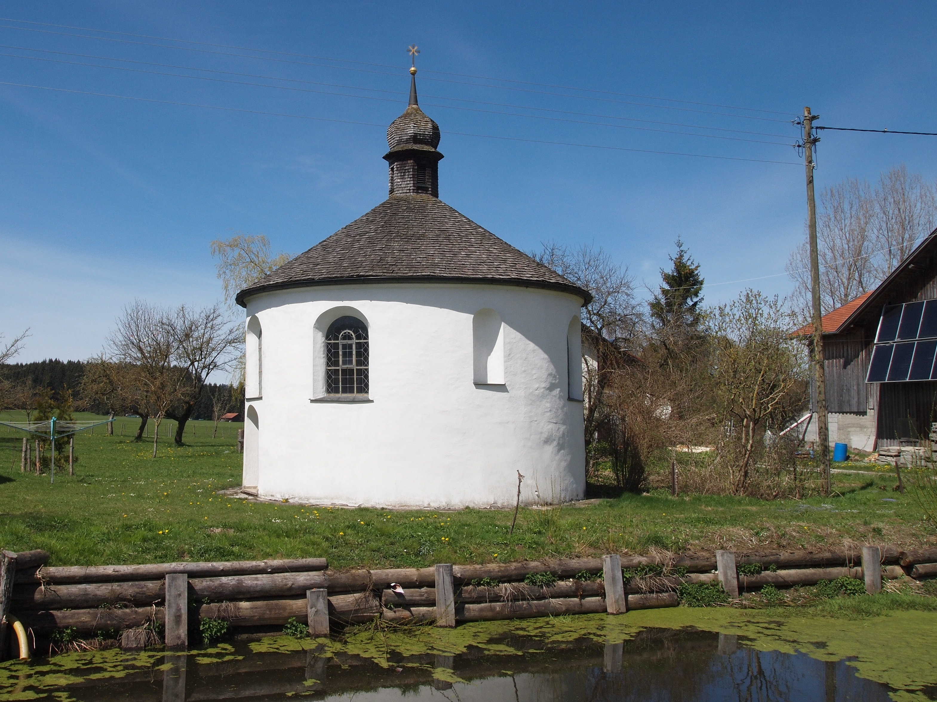 Westerried, Antoniuskapelle